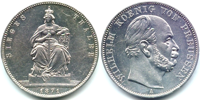 1 союзный талер Пруссия, победа над Францией